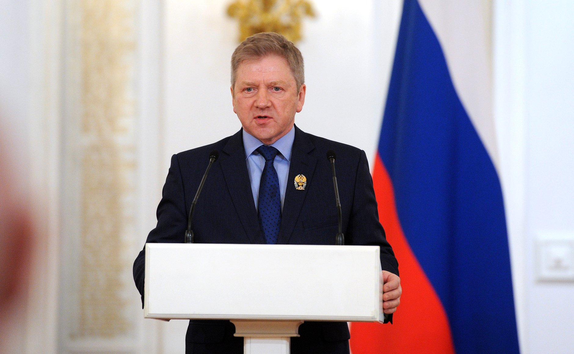 Вручение Государственных премий Российской Федерации за 2015 год. Лауреат Государственной премии в области науки и технологий Сергей Недоспасов